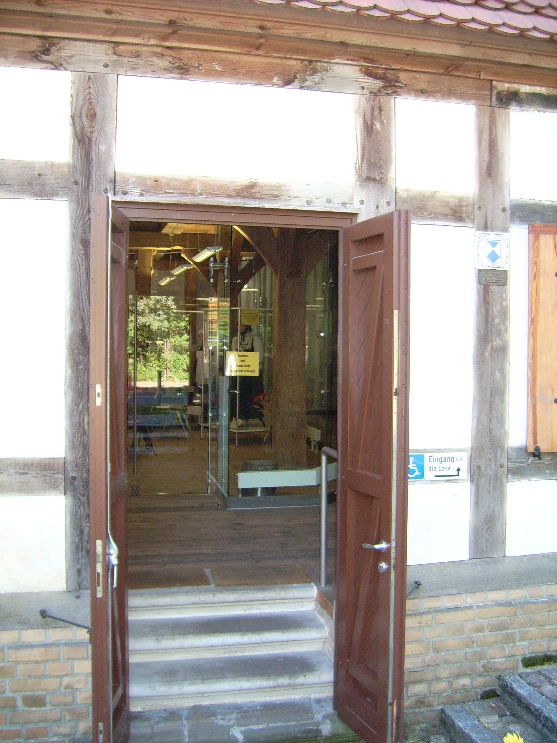 Rauhfutterspeicher Schöneiche - Eingang